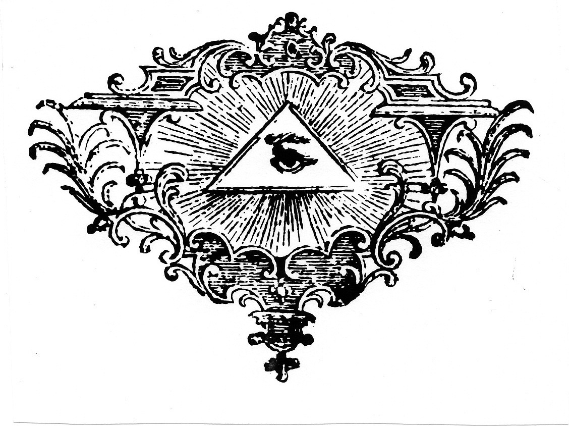 Gyakran használt záródísz